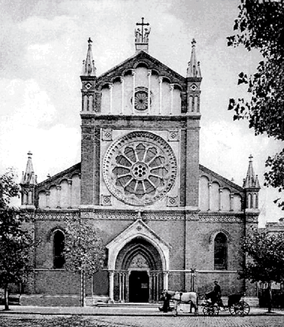 Kathedrale St. Josef in Bukarest 1903